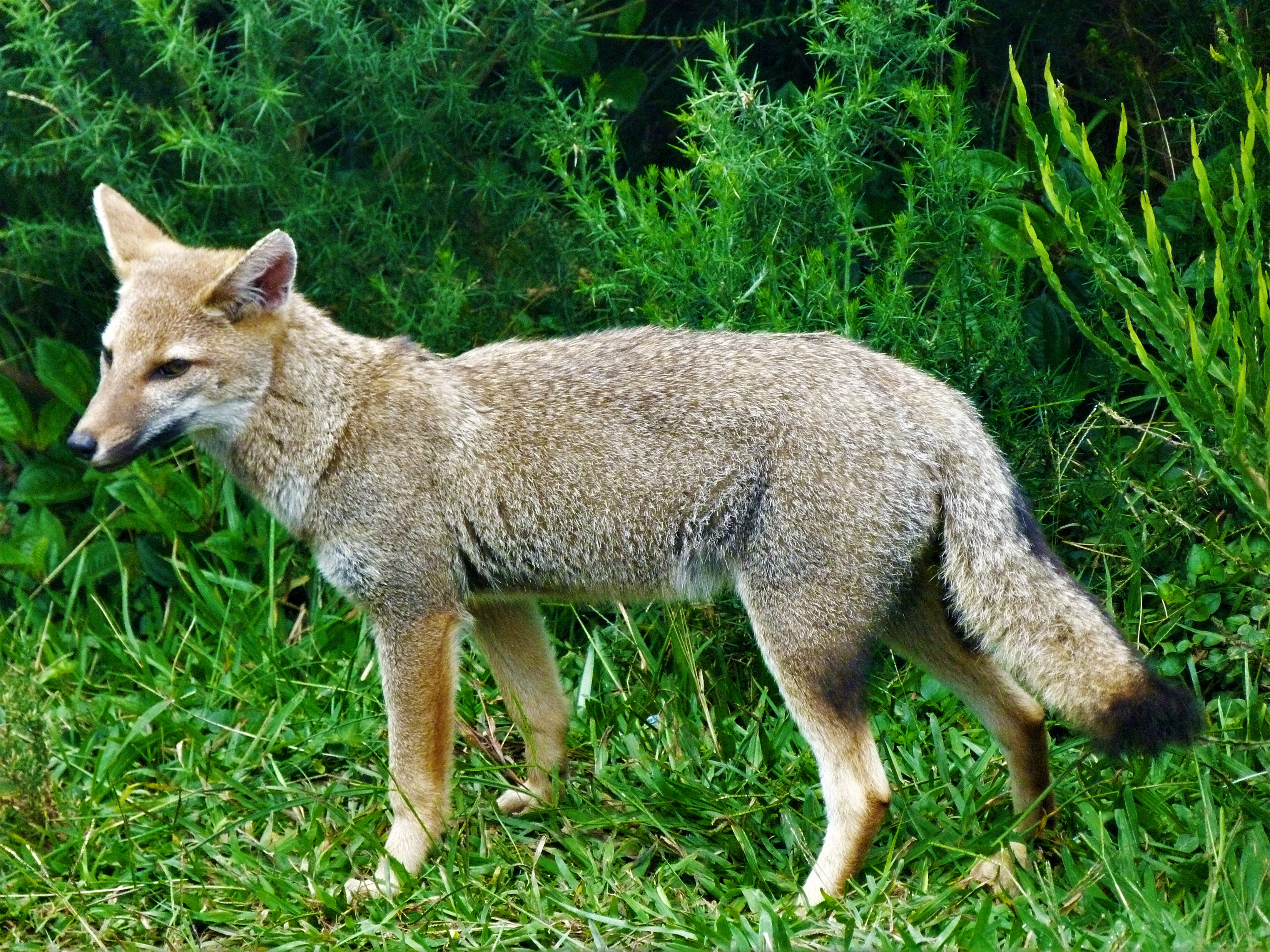 Graxaim do campo na trilha dos cânions Fortaleza/Itaimbezinho